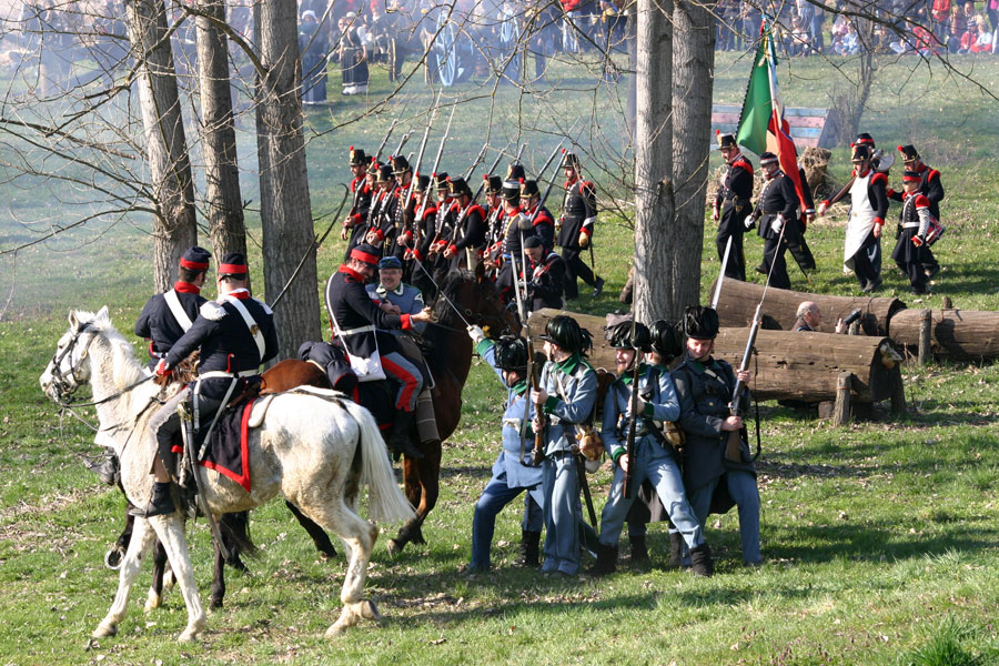 Rievocazione storica in costume della Battaglia della Bicocca, Novara (23 marzo 1849)